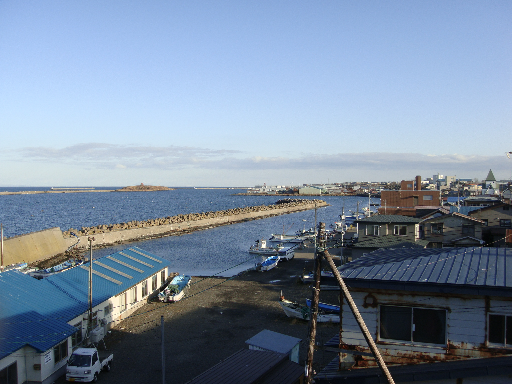 根室港（根室市）